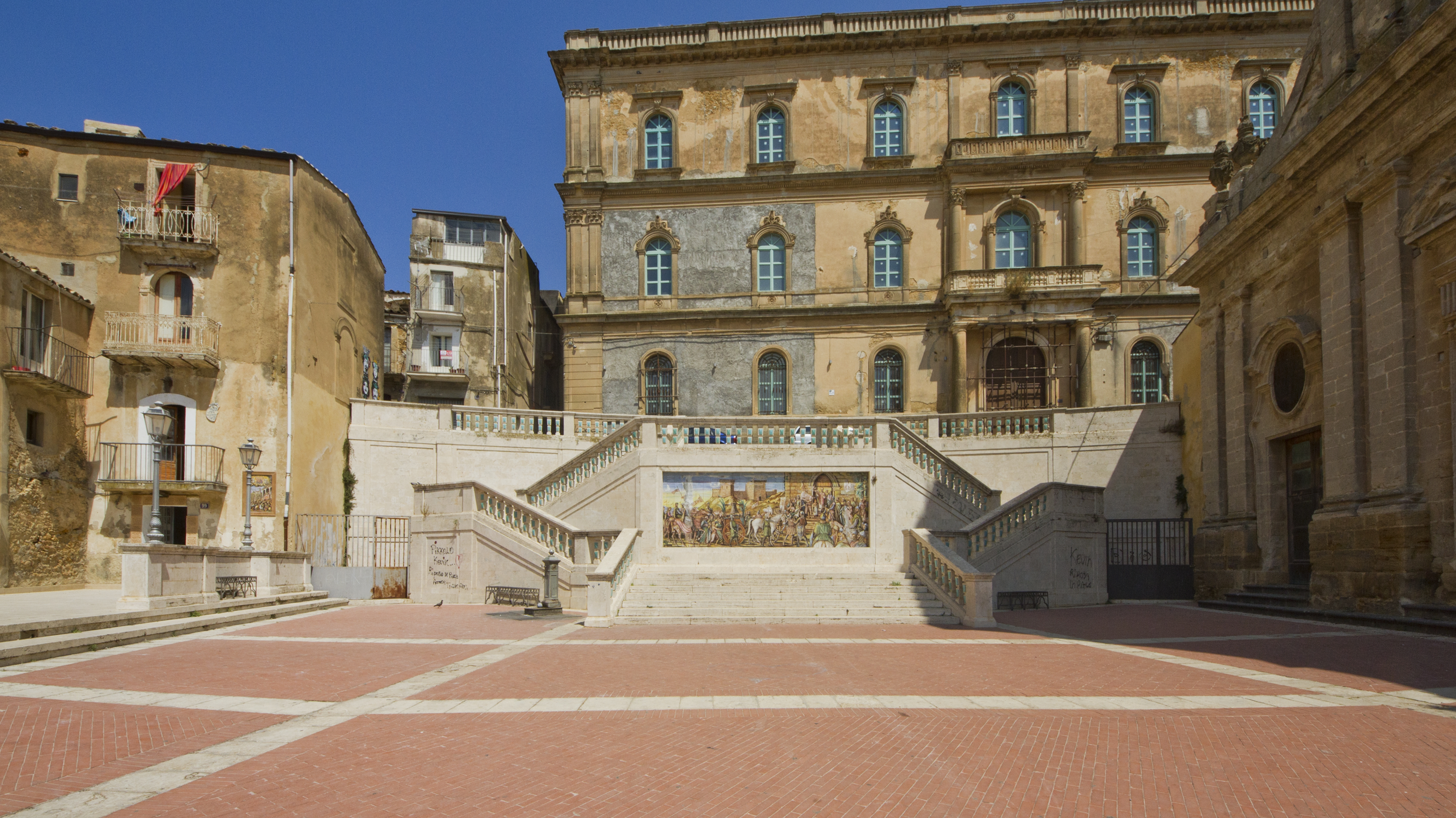 95041 Caltagirone, Province of Catania, Italy